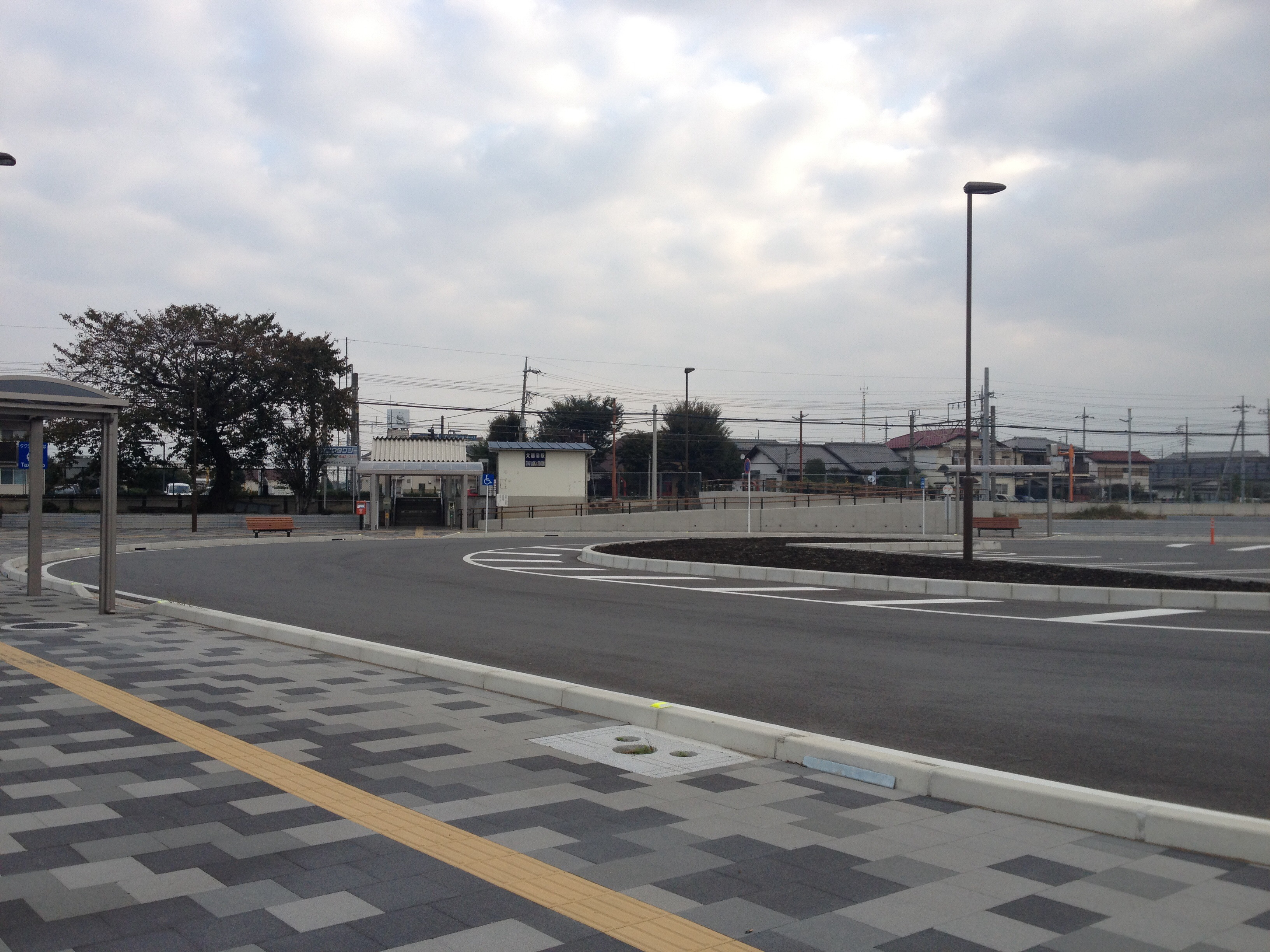 北藤岡駅の整備後の様子。左手前はタクシー、右奥はバスの乗り場。駐車場もある。